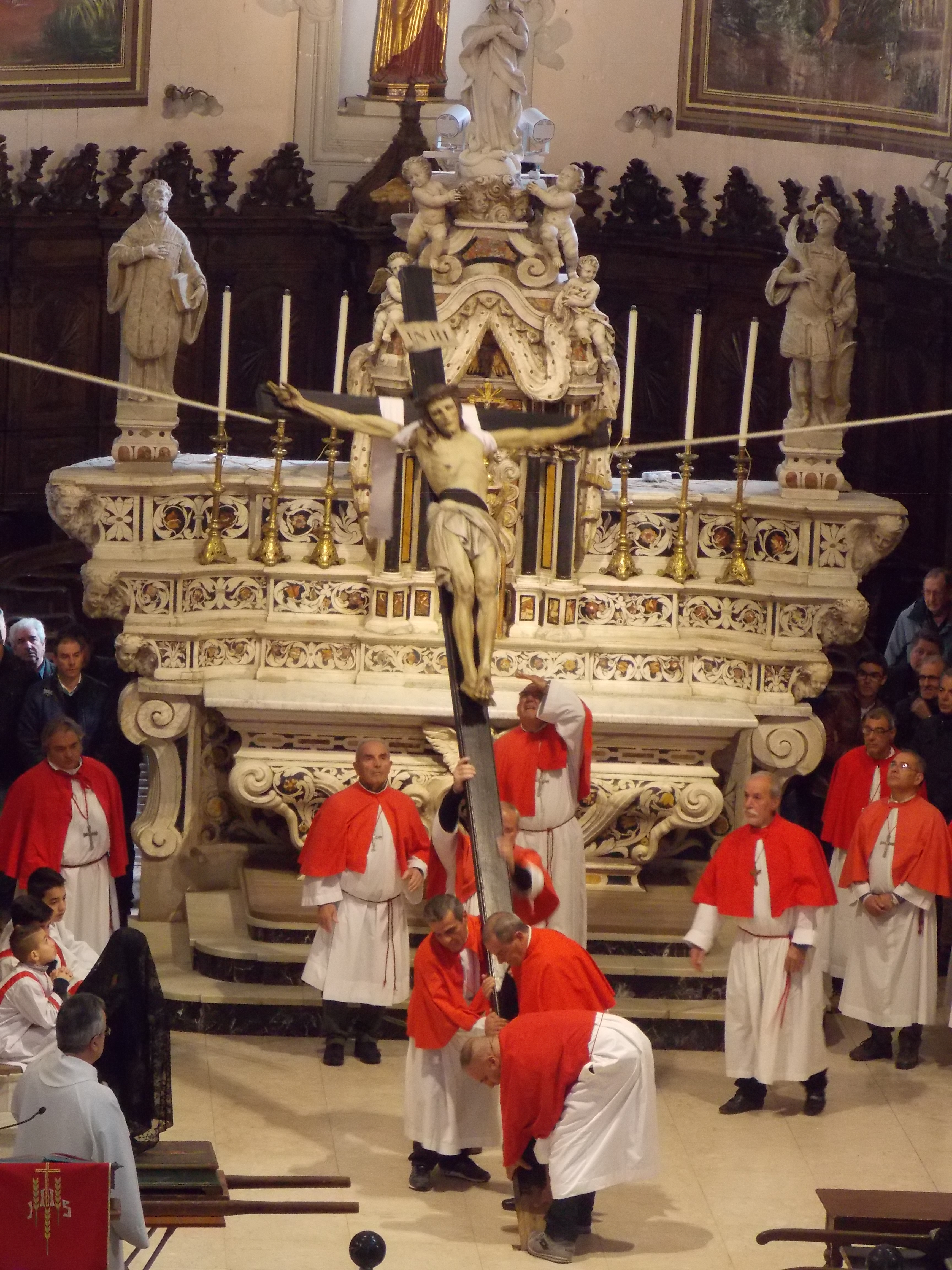 Innalzamento della Croce in Cattedrale.